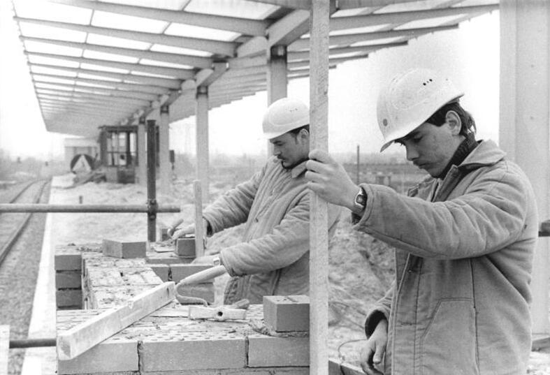 Berlin, Bahnsteig, maurer ADN-ZB Settnik 25.3.1988 Berlin: U-Bahn-Verlängerung- Ab Mitte dieses Jahres wird die U-Bahn-Linie E über den bisherigen Endpunkt Tierpark hinaus zu zwei neuen Bahnhöfen verkehren. An der vorläufigen Endhaltestelle Elsterwerdaer Platz ist der über der Erde gelegene U-Bahnhof rohbaufertig. Karsten Baning (r.) und Peter Hagen vom VEB Bau Stralsund mauern an den künftigen Bahnsteiggebäuden. Der erste Teilabschnitt der verlängerten U-Bahn-Linie entspricht etwa einem Drittel der Gesamtlänge der neuen Strecke. (siehe auch 7N)